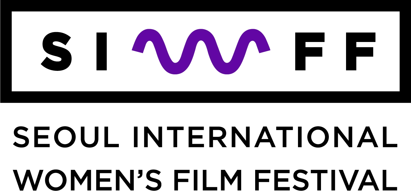 SIWFF LOGO